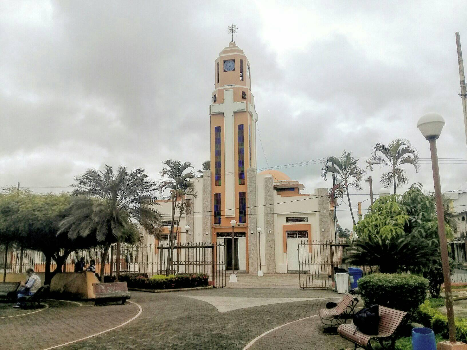 Iglesia de San Francisco de Asís, en Puebloviejo, Los Ríos, Ecuador.